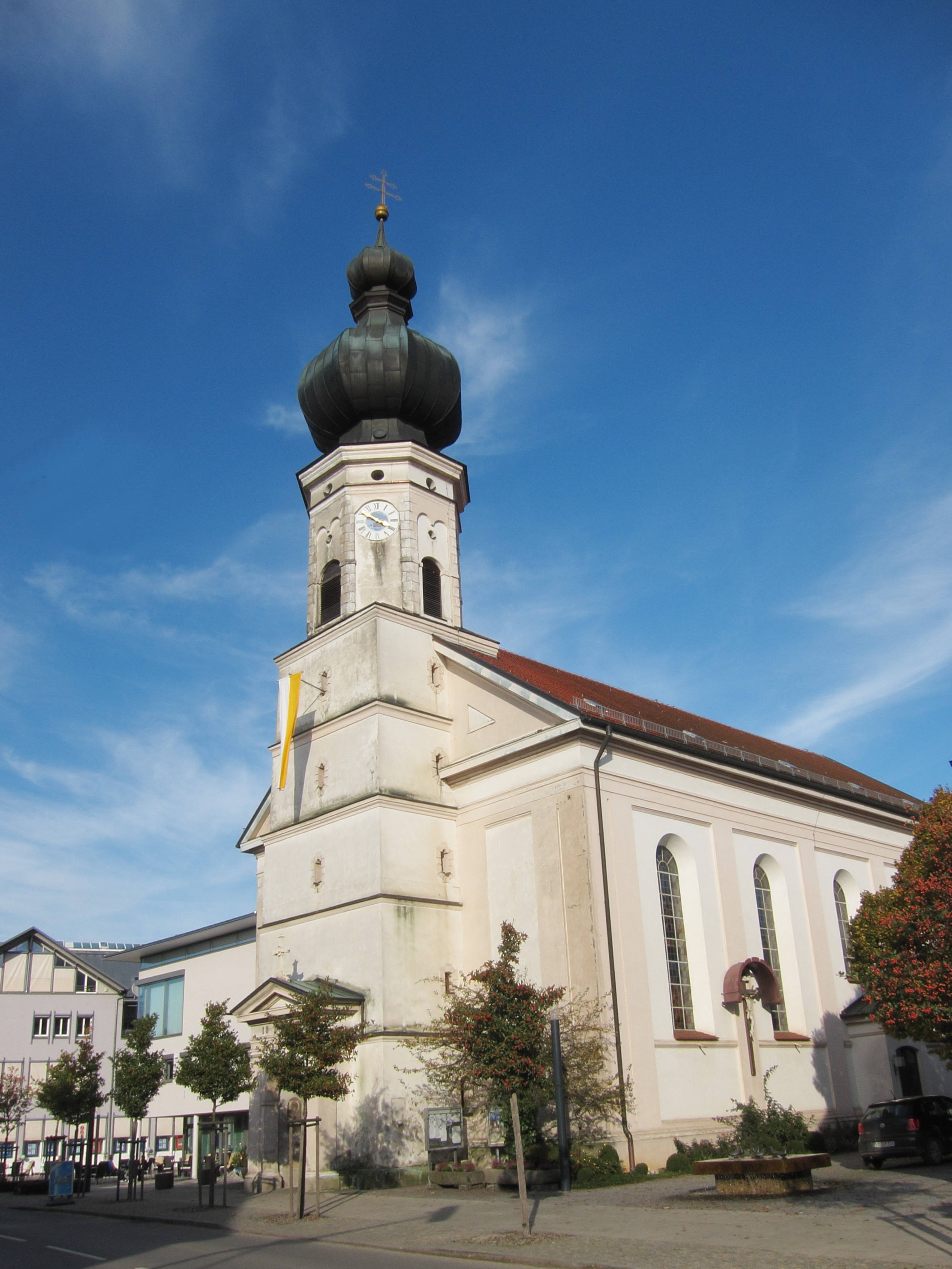 Marktplatz 9; katholische Pfarrkirche St. Pauli Bekehrung, historisierender Saalbau mit stark eingezogenem polygonalem Chorabschluss, angefügter Sakristei und Spindelhelm, von Joseph Elsner 1889/90; Unterbau des Westturms noch spätgotisch; mit Ausstattung des Vorgängerbaus.